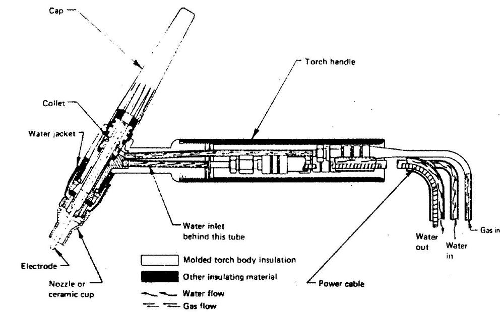 مسدس لحام القوس بغاز التنجستن